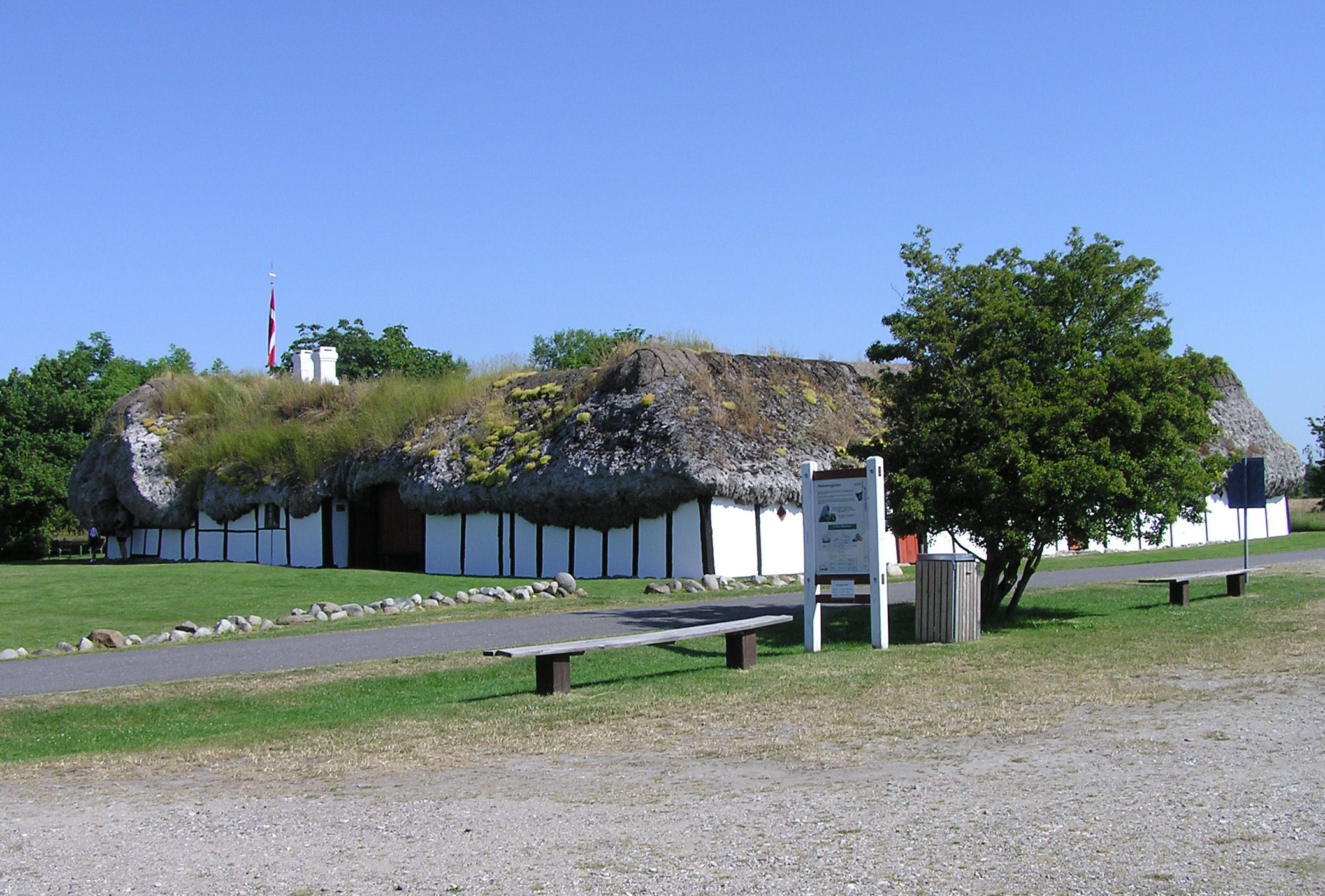 Museumsgården, Læsø